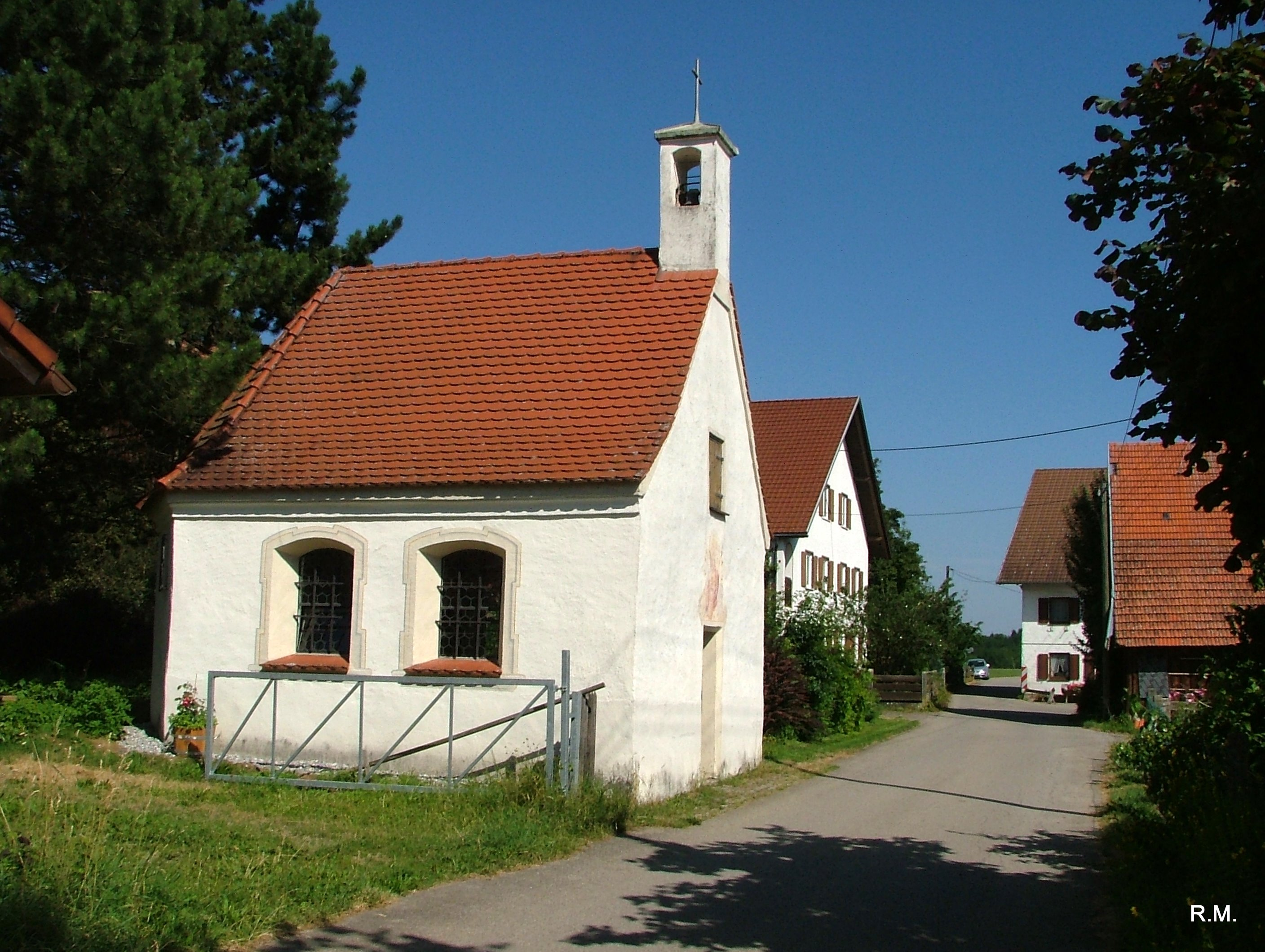 Bossarts Kapelle, St. Maria von 1792